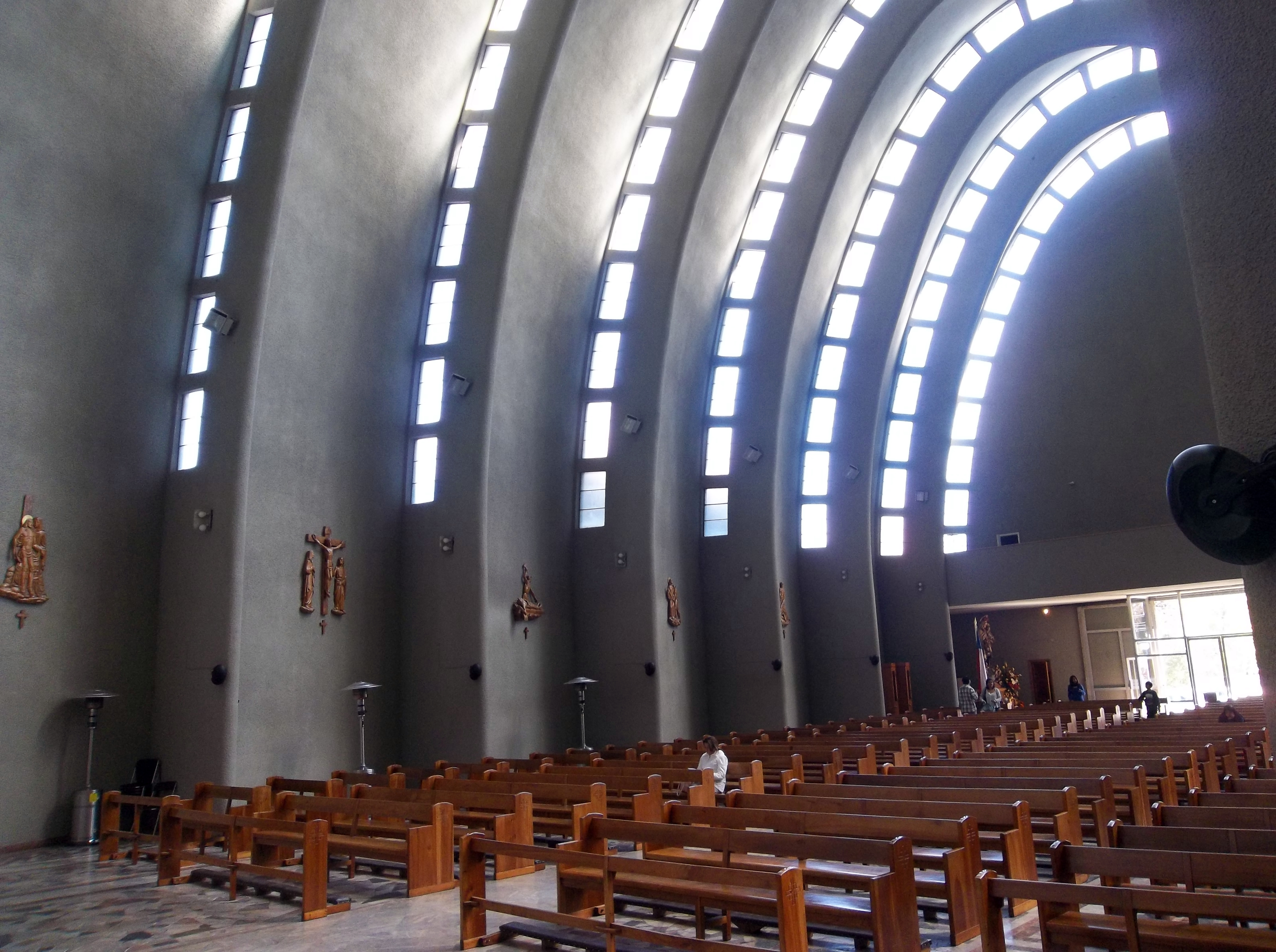 Ventanales Catedral de Chillán